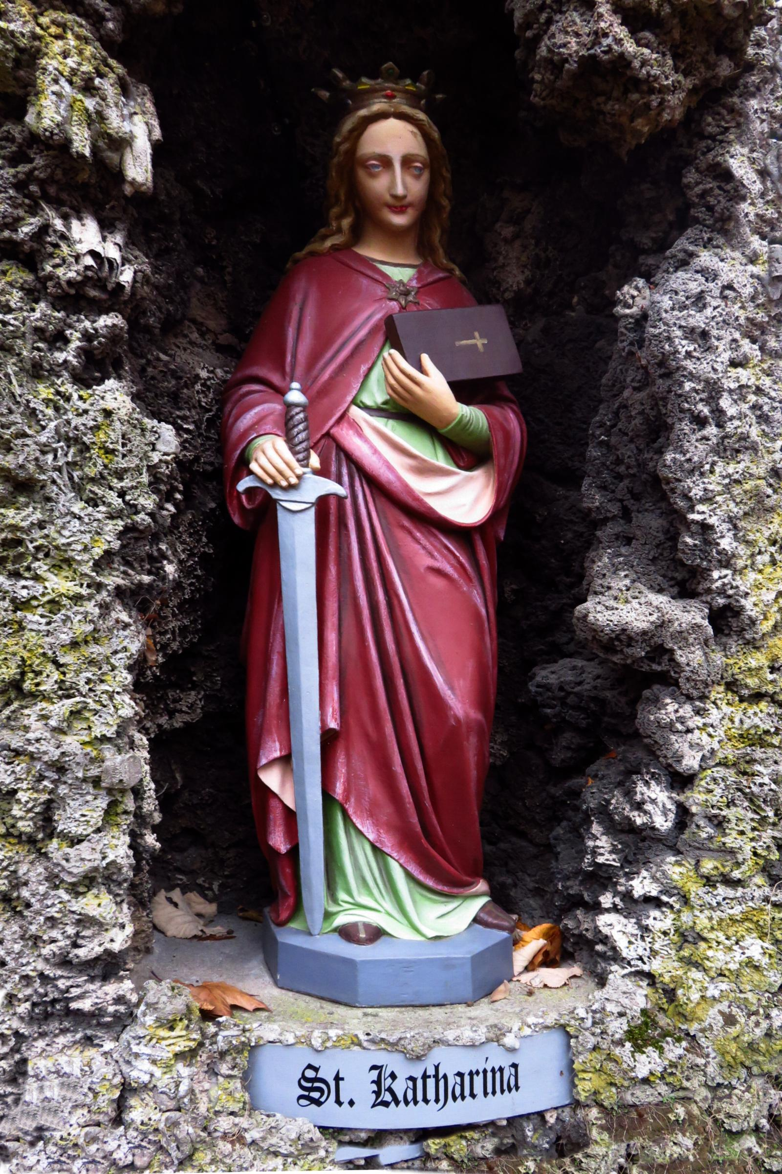 Grottenanlage in Hehn Heiligenpesch